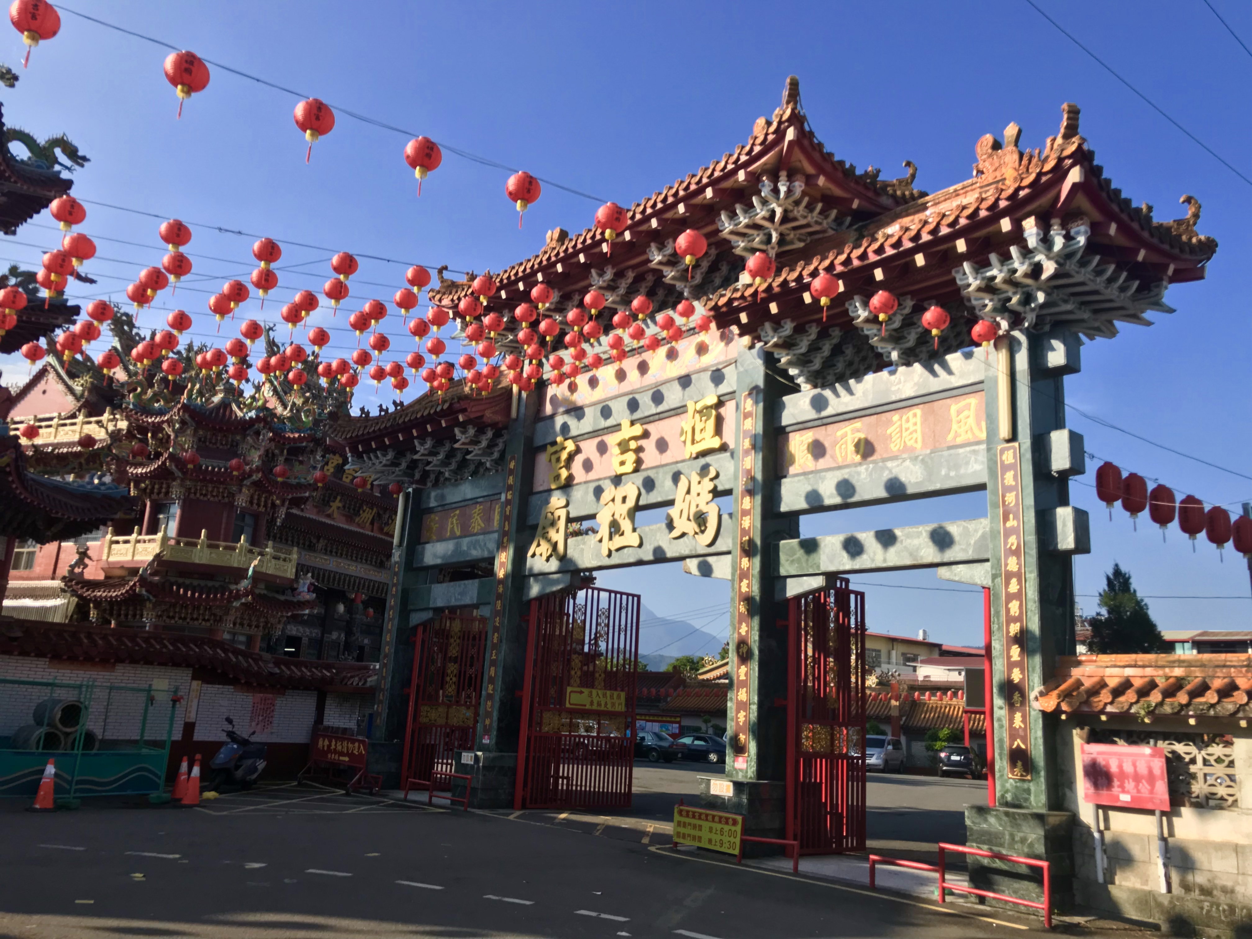 中文（台灣）: 恒吉宮牌樓